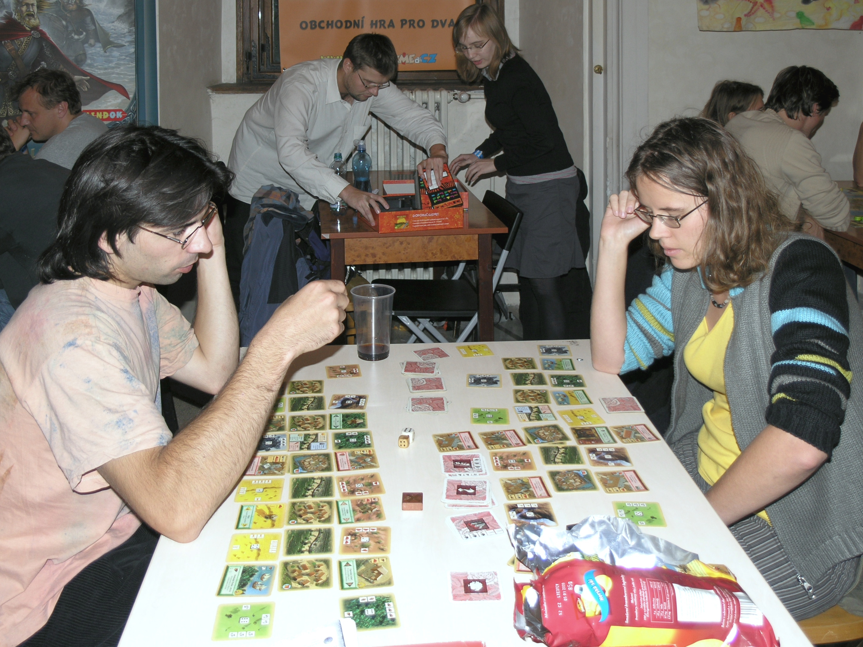 Deskohraní 2008 - Osadníci z Katanu, karetní hra